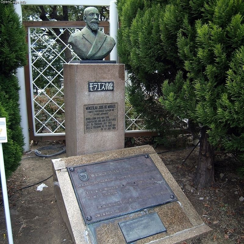 ヴェンセスラウ・デ・モラエス